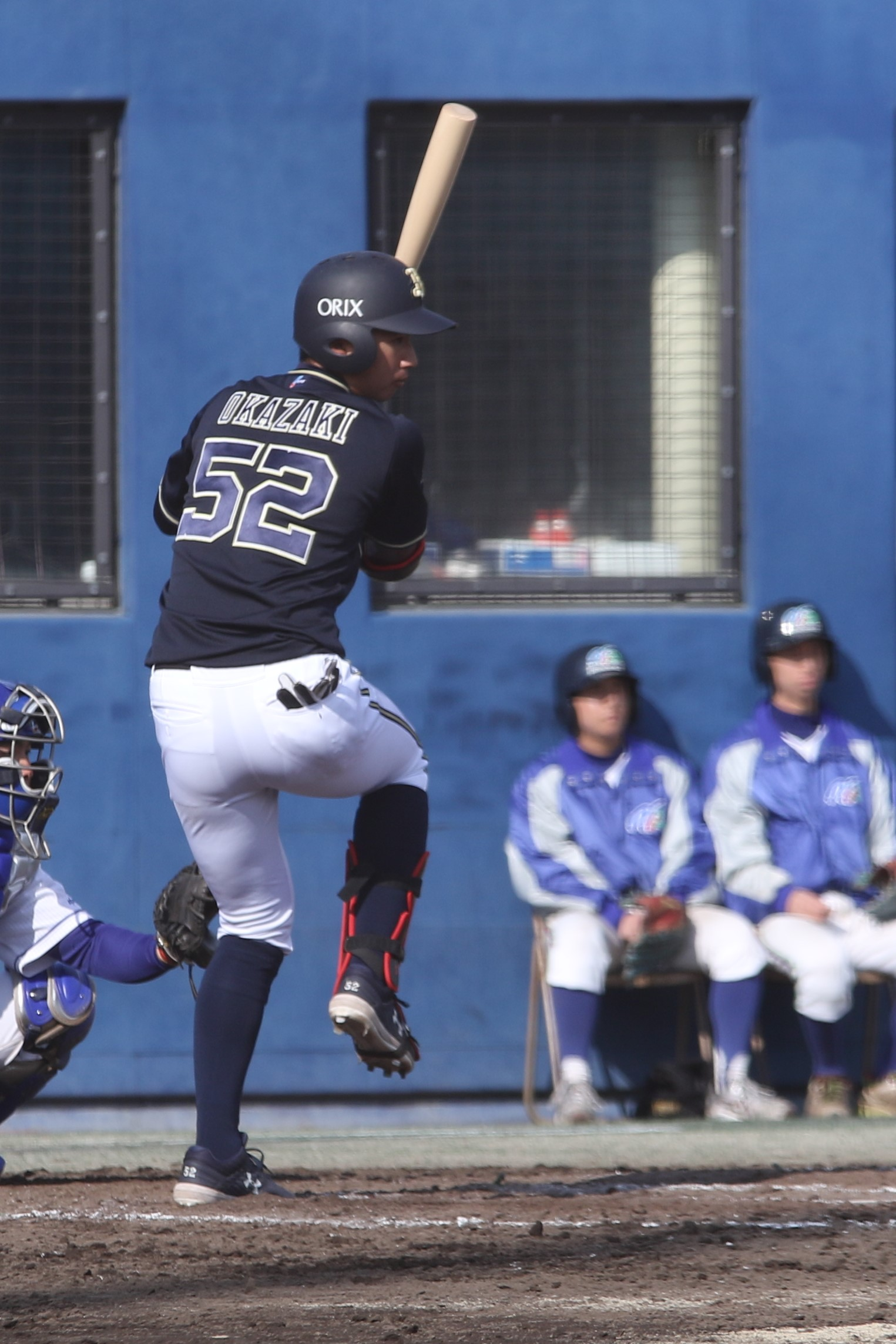 2019年3月17日、ナゴヤ球場にて